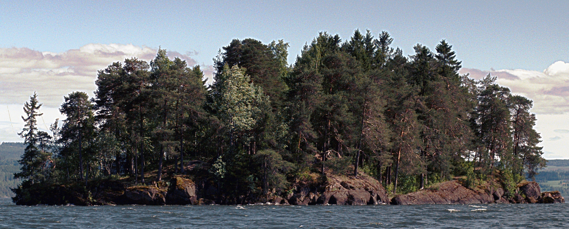 Steinsholmen fra nordvest